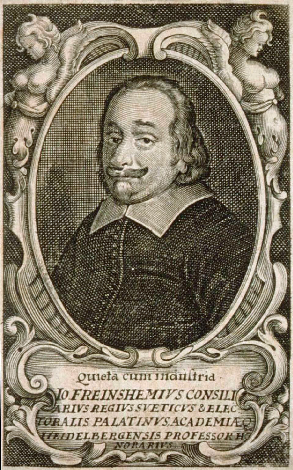 Quieta cum industria. Io Freinshemius consili arius regius sveticus et electoralis Palatinus, academiae Heidelbergensis professor honorarius (1608-1660), Buste, 3/4 à g., en méd. ov. Bibliothèque nationale et universitaire de Strasbourg